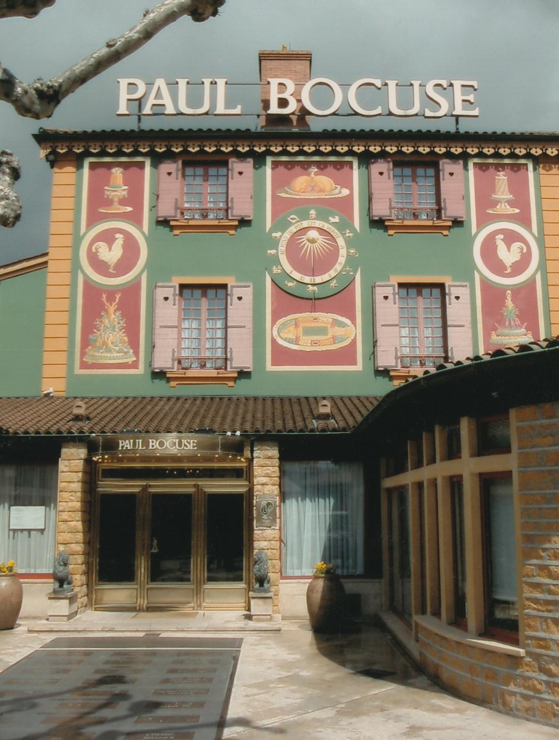 Restaurant Paul Bocuse in Collonges au Mont d`Or Datum: 04/2001 Urheber: Michael Pfeiffer Quelle: privates Fotoalbum des Urhebers